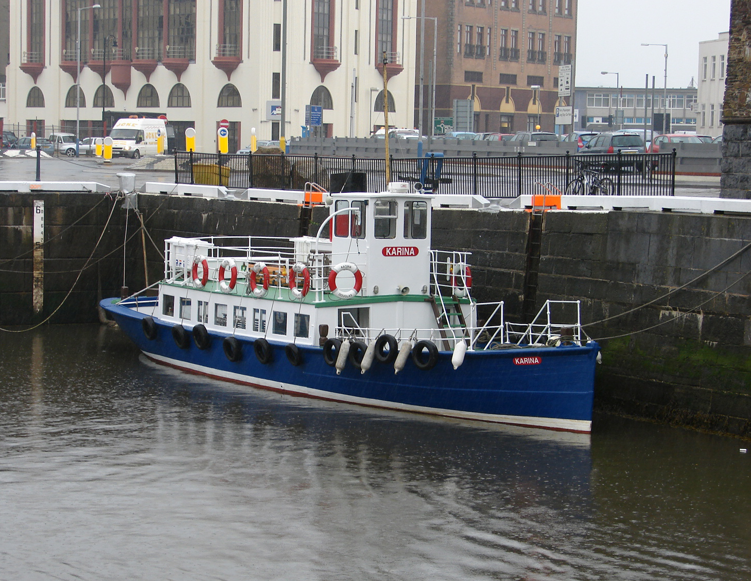 MV Karina in Douglas Harbour, 5 May 2011